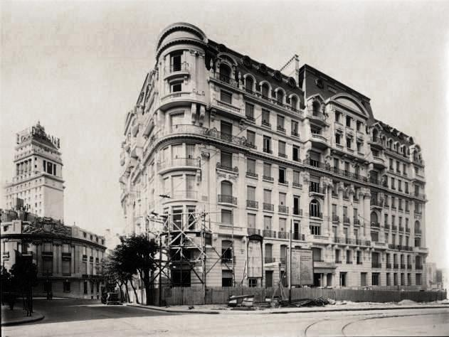 Edificio Estrugamou, diseñado por los arquitectos Sauze y Huguier en 1924 e inaugurado hacia 1929. Se encuentra en las calle Arroyo y Esmeralda, en Buenos Aires.